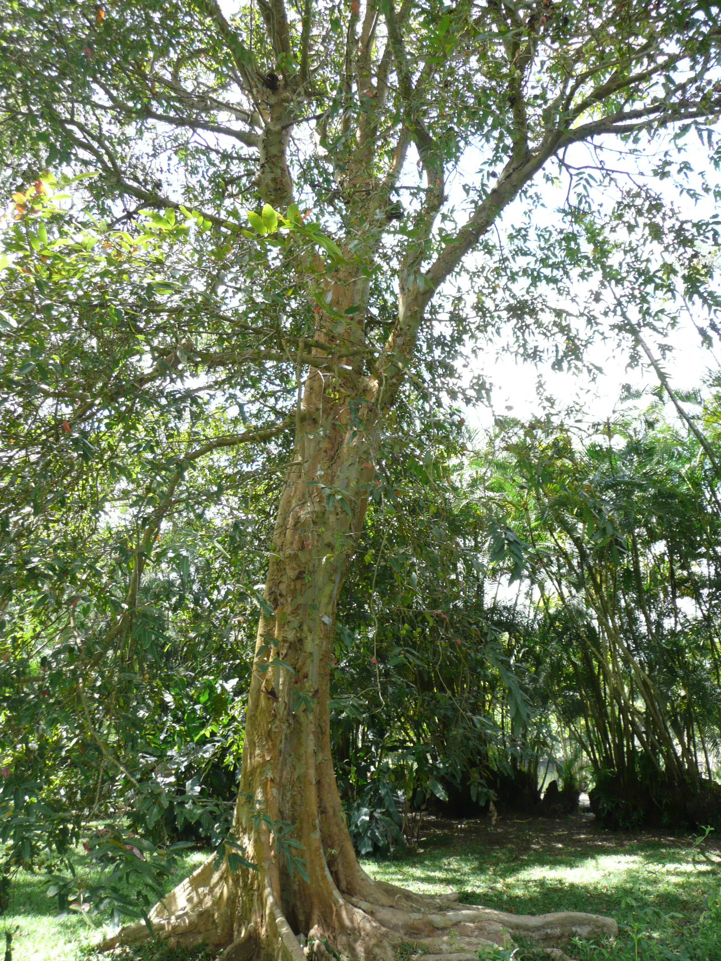 Terminalia arjuna in Sir Seewoosagur Ramgoolam Botanical Garden Map: 20° 6' 25" S 57° 34' 46" E